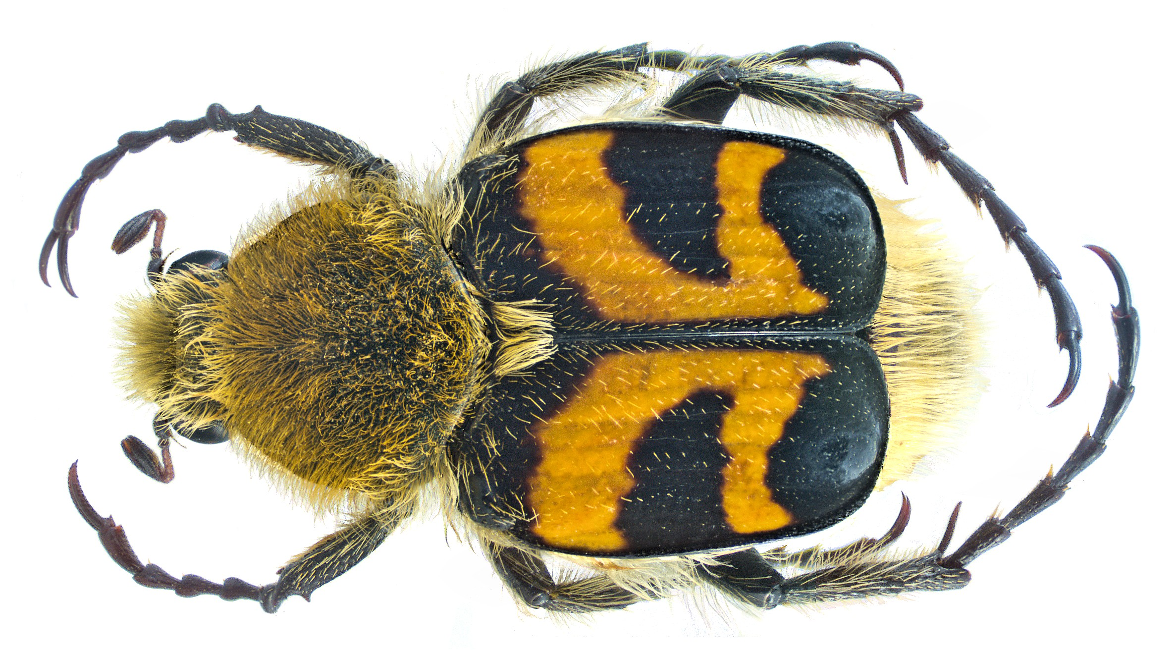 Familie: Scarabaeidae Grösse: 9-12 mm Verbreitung: Europa Ökologie: Entwicklung im morschen Holz von Laubbäumen Fundort: Germania, Oberfranken, Kulmbach leg. det. U.Schmidt, 1976 Foto: U.Schmidt, 2005